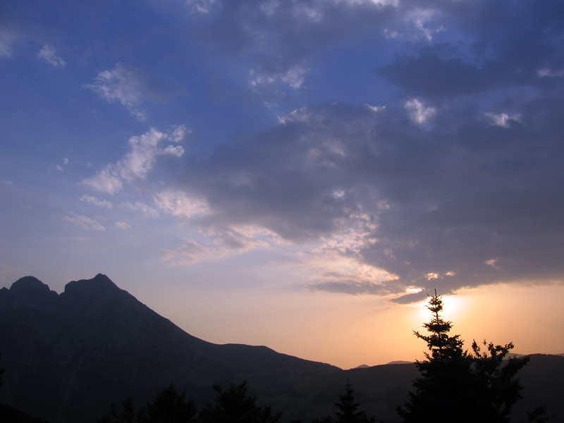 Komovi u sumrak